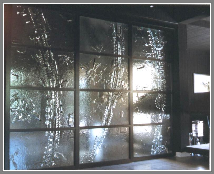 Carlo Roccella